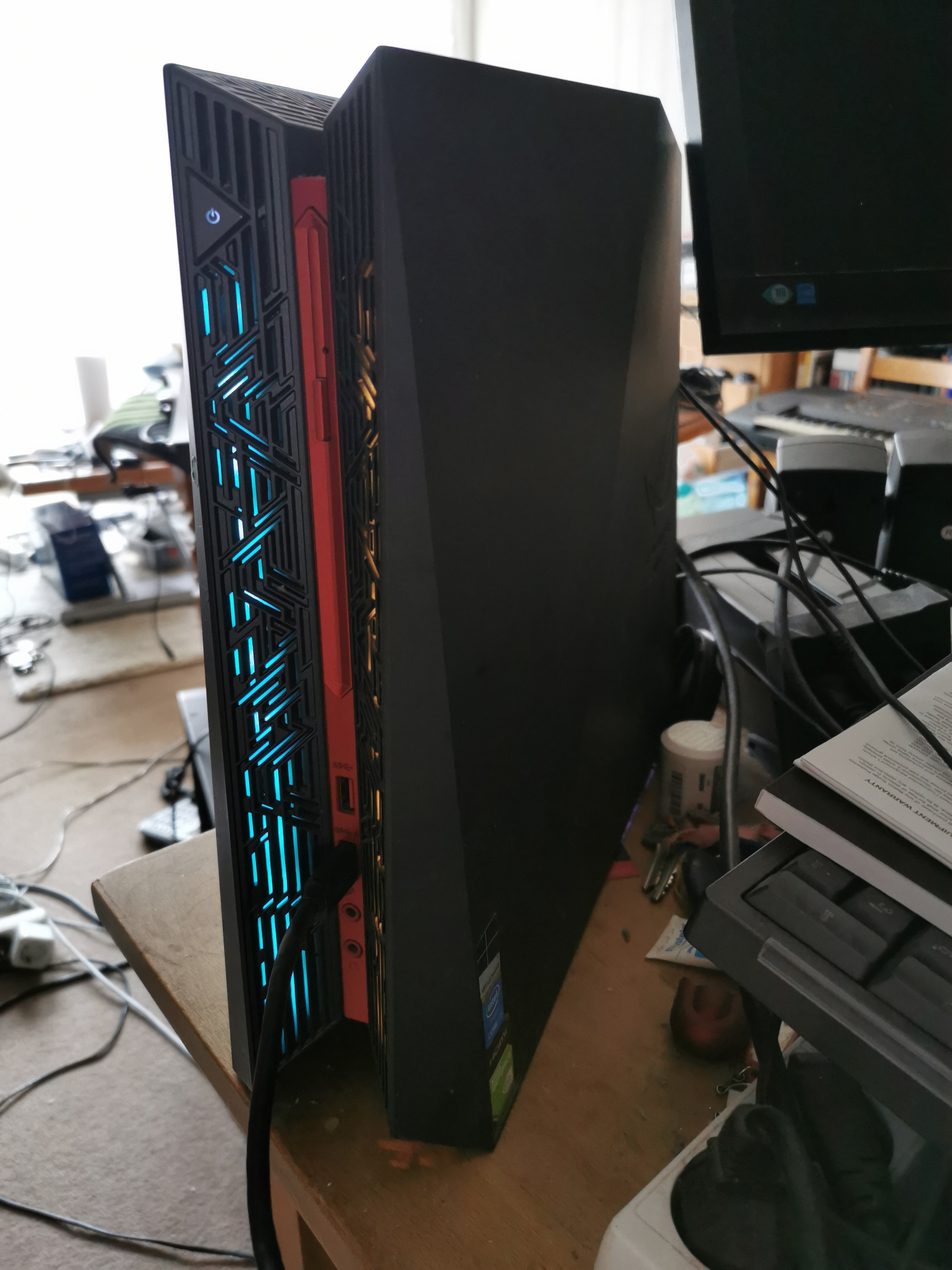 The ROG G20 computer (this is an AJ version)